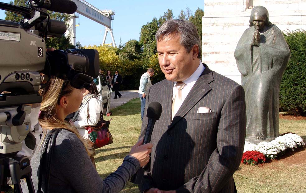 Infoslika Opis: Na fotografiji je Vladimir Todorović u Puli Izvor: Gicetova osobna foto-arhiva Autor: Giceto Objašnjenje: Suradnik Giceto snimio je ovu fotografiju i stavlja je Wikipediji na raspolaganje za neograničenu uporabu